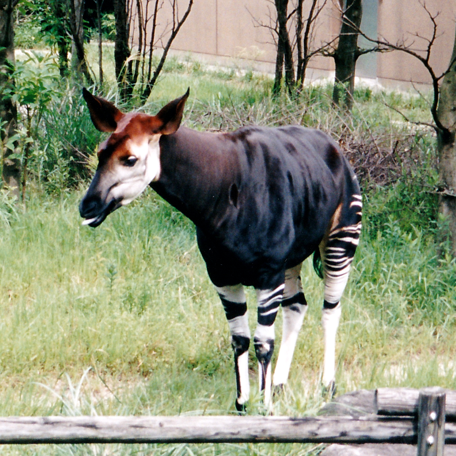 よこはま動物園ズーラシアのオカピ